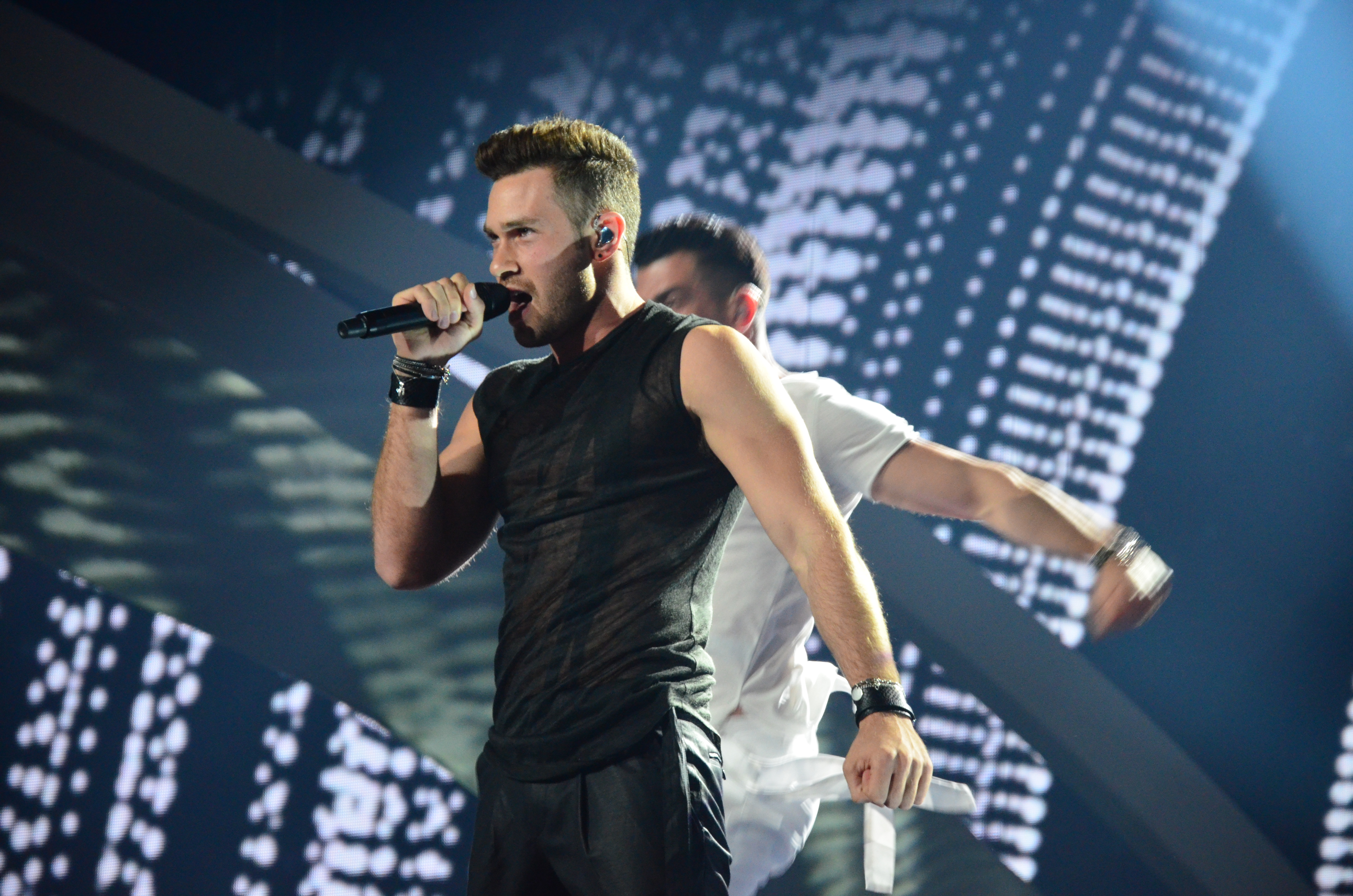 10 травня 2017 року у Києві відбулась генеральна репетиція 2 півфіналу "Євробачення".